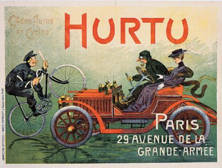 Hurtu